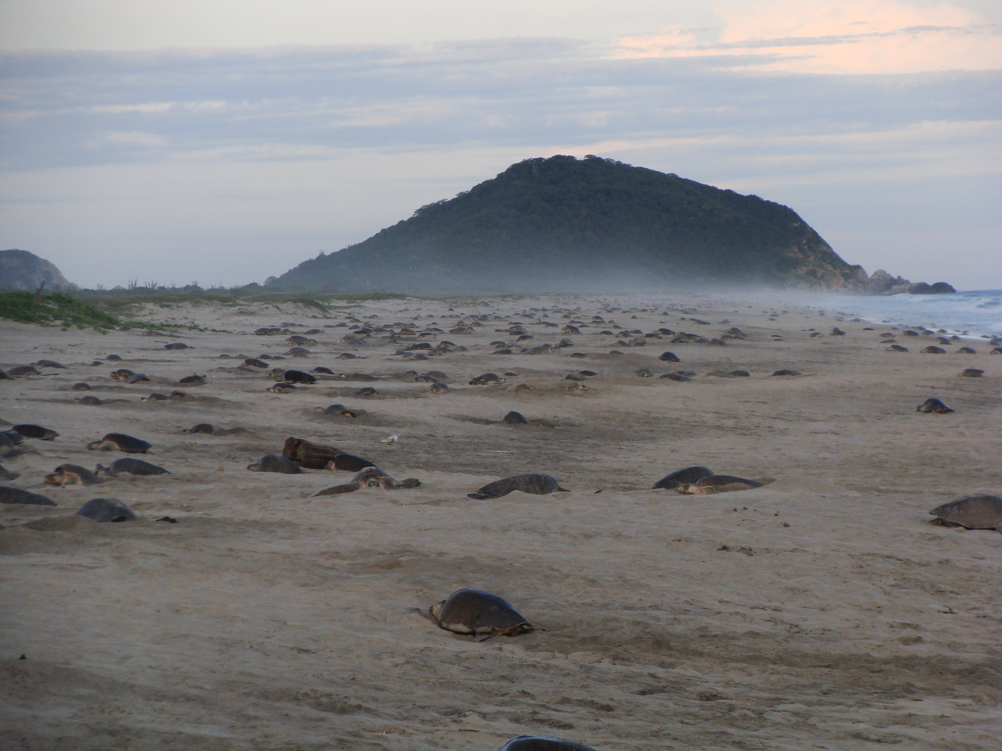 inicio de la arribada de tortuga marina Lepidochelys olivacea, Oaxaca Mexico